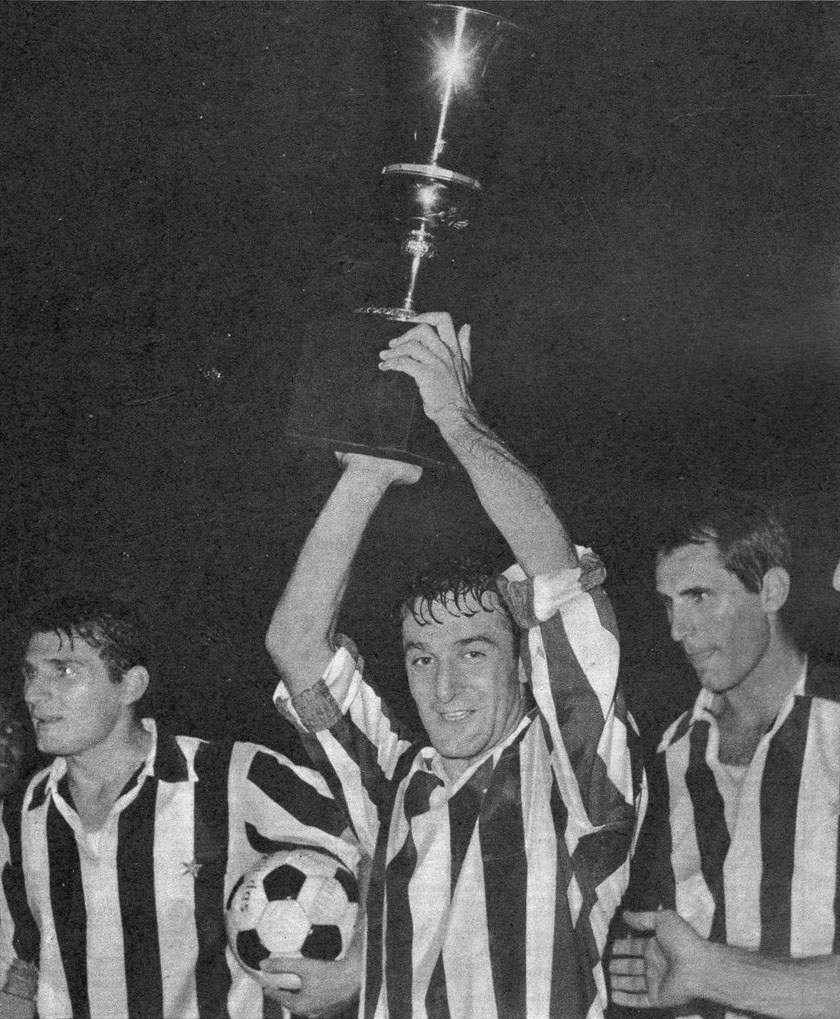 Roma, stadio Olimpico, 29 agosto 1965. Da sinistra: i bianconeri Gianfranco Leoncini, Giampaolo Menichelli e Giancarlo Bercellino (I) festeggiano il successo della Juventus nella Coppa Italia 1964-65 conquistata battendo in finale l'Inter (1-0).